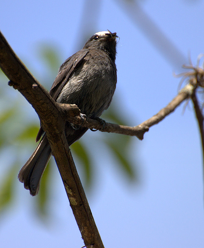 "Fazenda do Estado" localizada no município de Manduri-SP